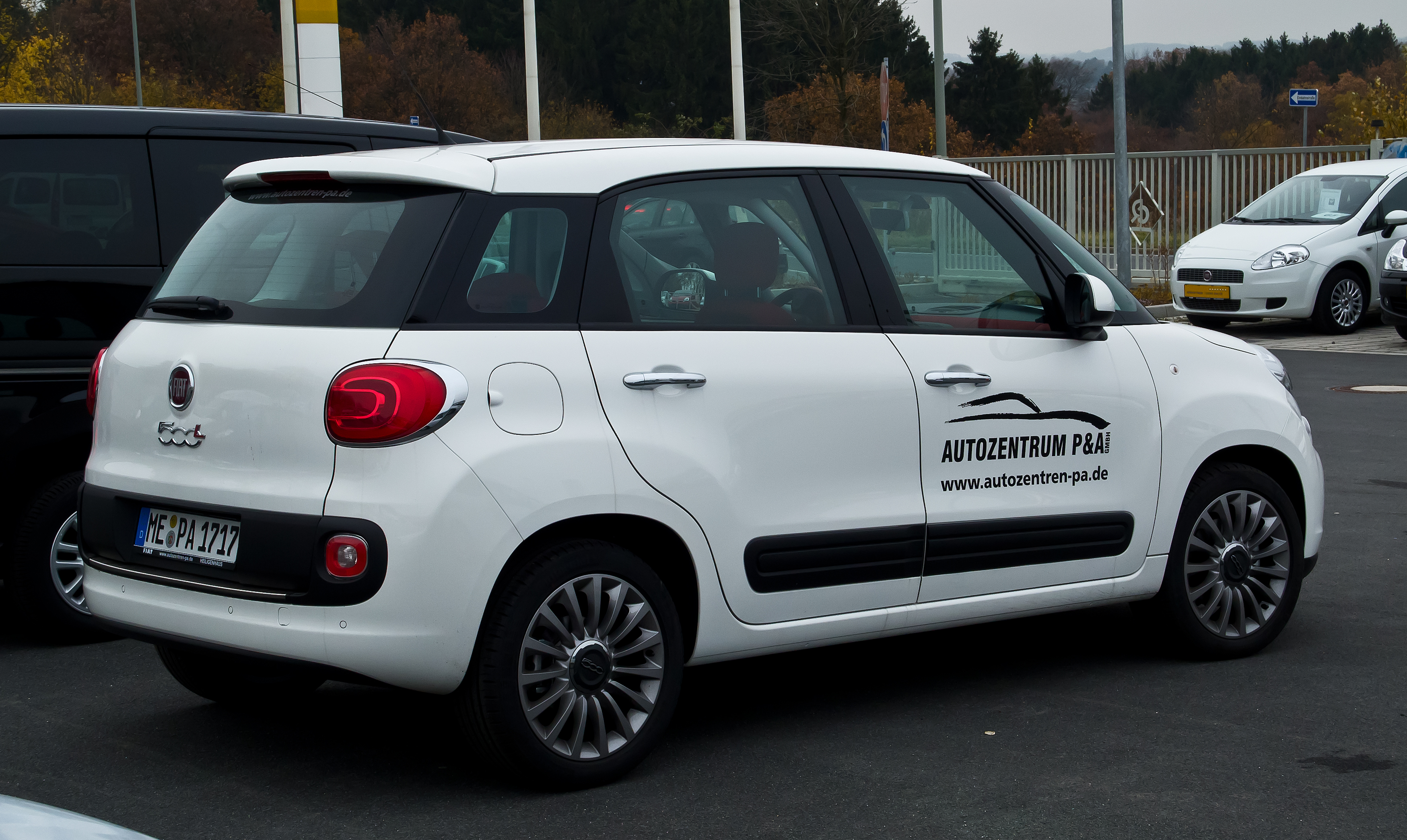 Fiat 500L 1.4 16V Easy